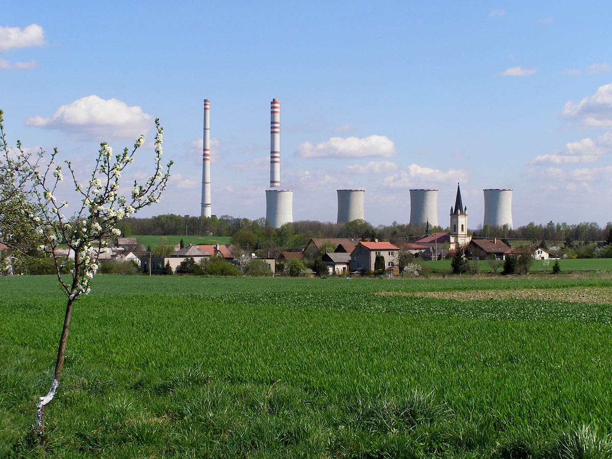 Pohled na obec Dětmarovice s kostelem a elektrárnou